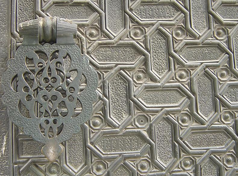 Detalle de la Puerta del Perdon de la Catedral de Sevilla